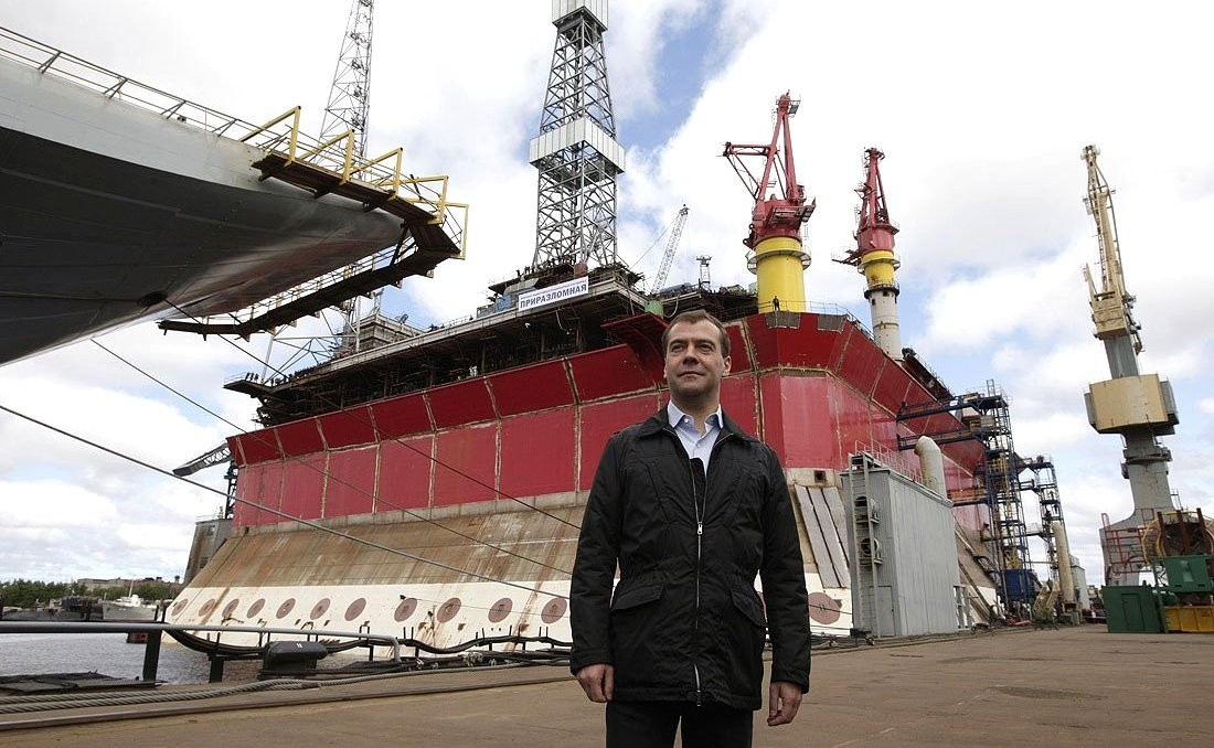 «Приразломная» во время строительства на верфи Северодвинска